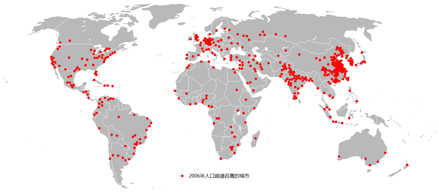 2006年时全球各城市中人口超过百万的城市列表，繁体版